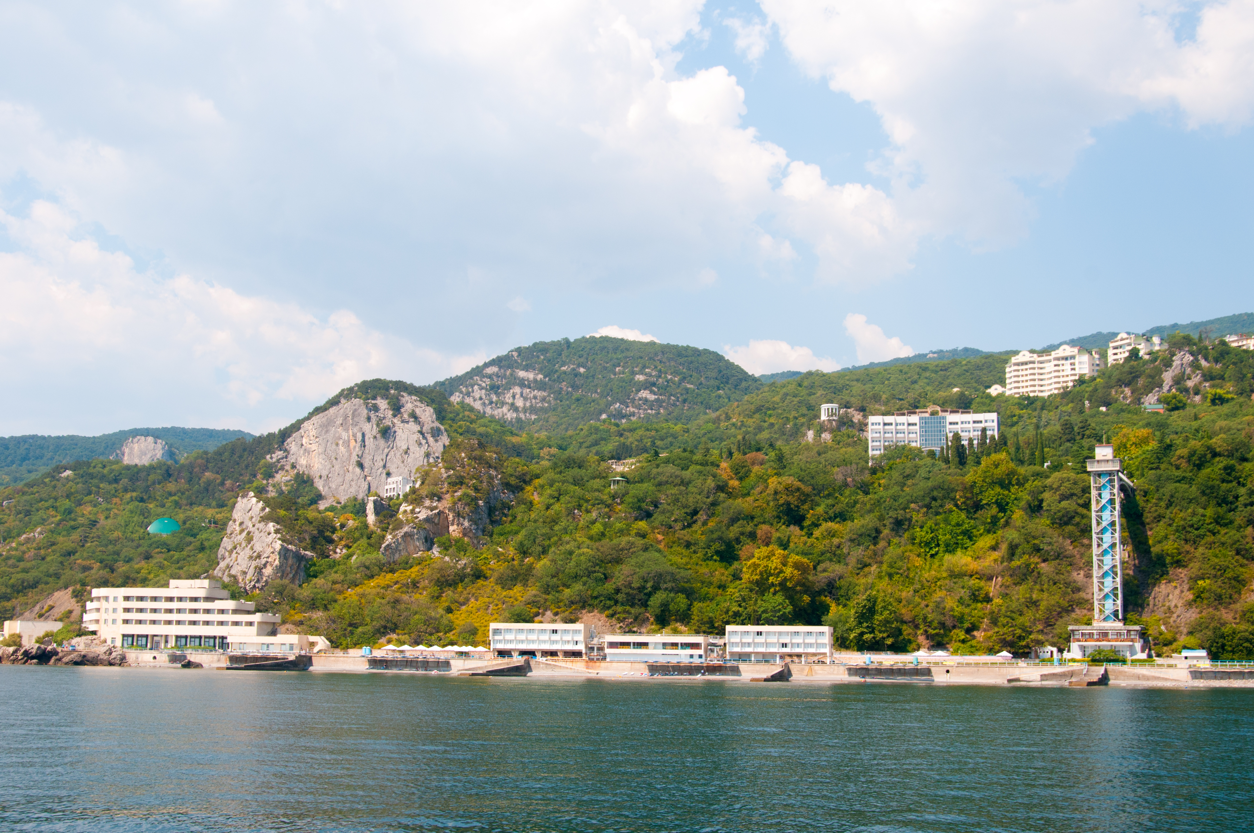 Нижняя Ореанда